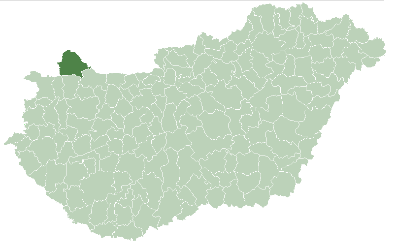 Poloha okresu v rámci Maďarska.